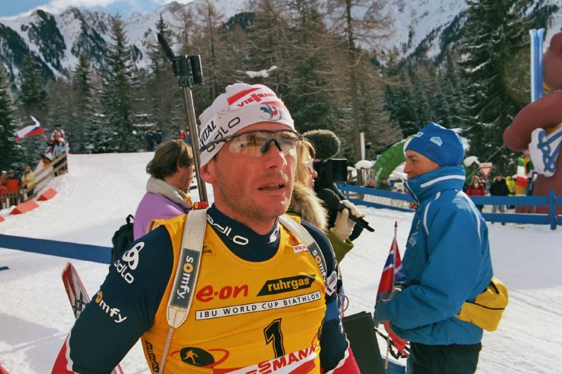 Raphaël Poirée während eines Rennens für den Biathlon-Weltcup 2006/2007 in Antholz